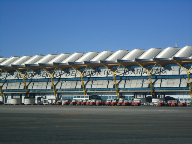 Vista al Aeropuerto de Madrid-Barajas